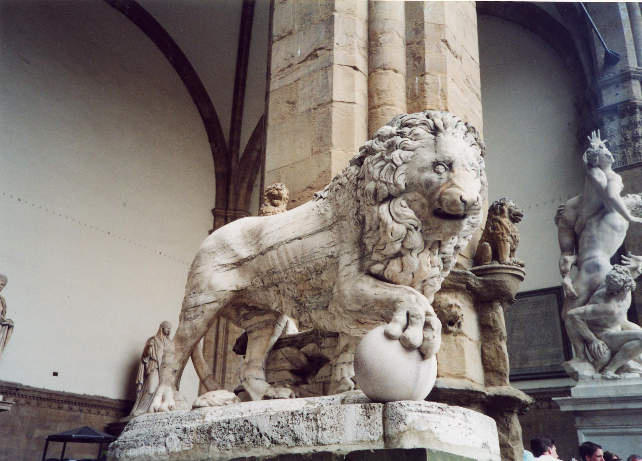 lion statue - loggia dei lanzi, Florence